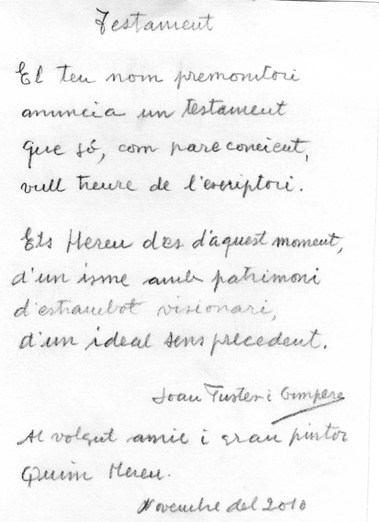 Fotografia del testament de l'estrambotisme